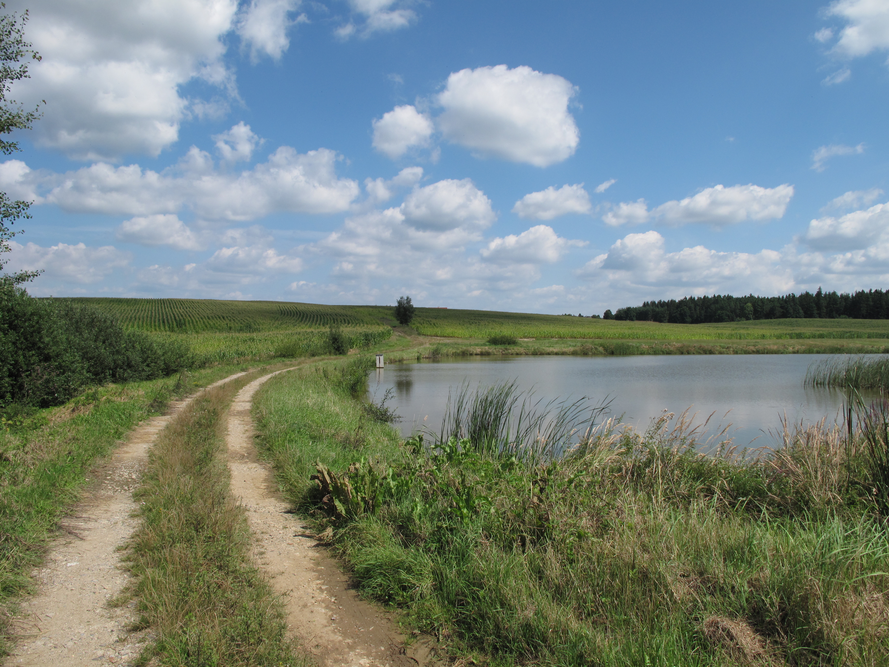 Formánkovský rybník. Okres Písek, Česká republika.